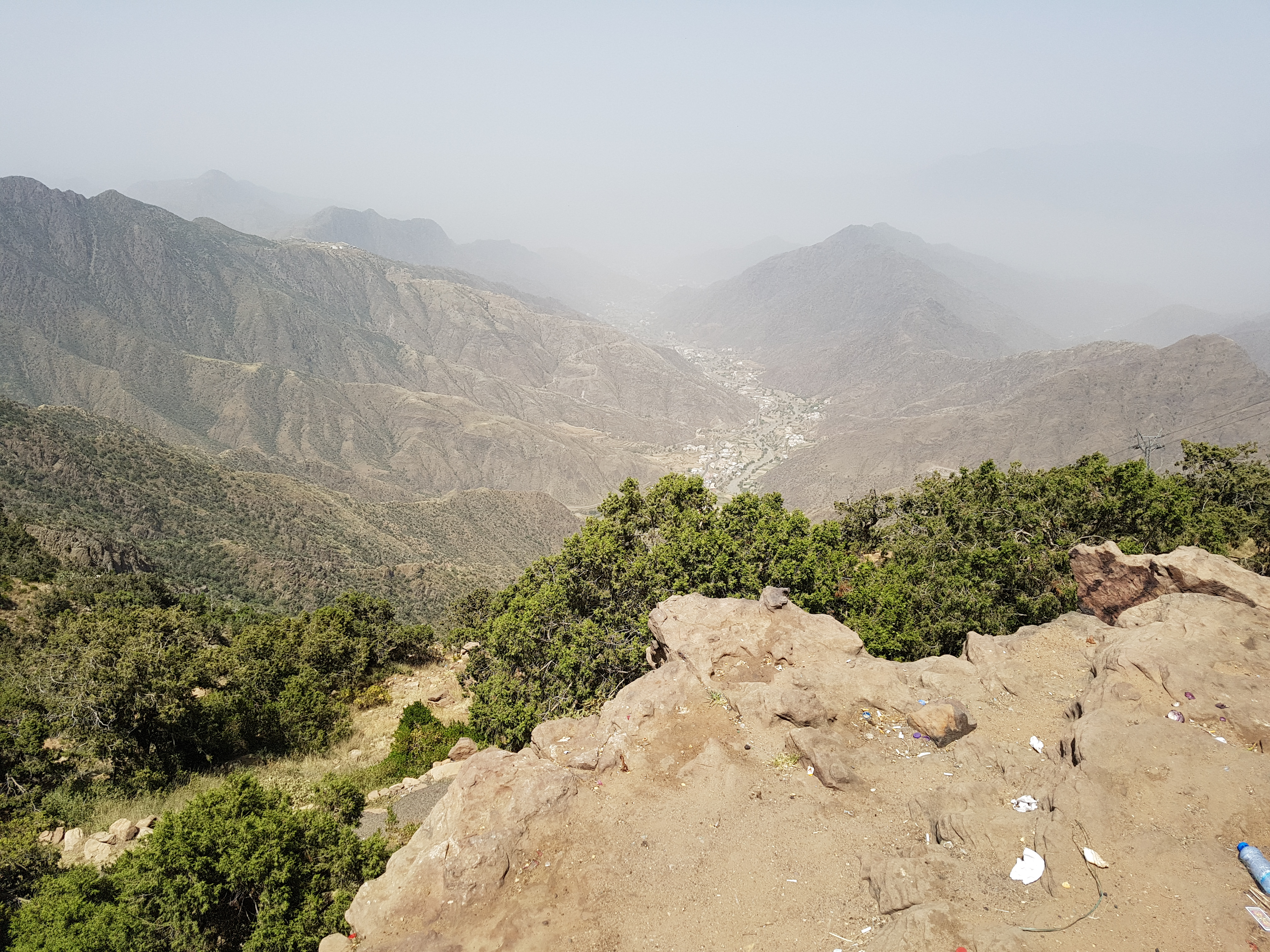 السودة هي قرية سياحية في منطقة عسير في المملكة العربية السعودية تبعد عن مدينة أبها قرابة 28 كلم، وعلى ارتفاع 3015 متر عن سطح البحر، وتكسو جبالها أشجار العرعر الكثيفة مكونة غابات طبيعية خلابة،وهي تعد إحدى قرى قبيلة عسير ويتجاوز عمر هذه القرية 500 عام